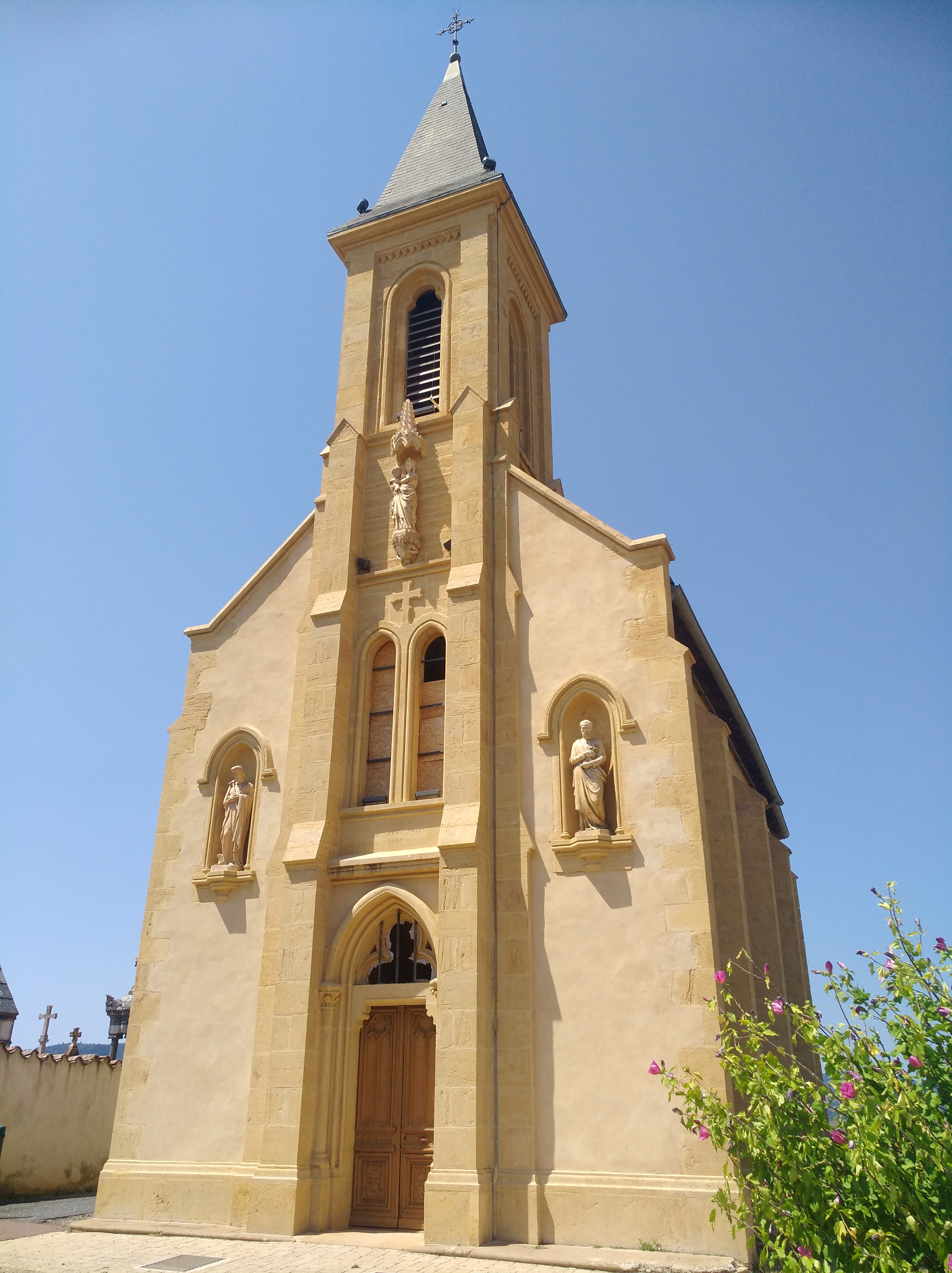 Chapelle de l'Immaculée-Conception de Saint-Laurent-d'Oingt (commune de Val-d'Oingt, Rhône, France).